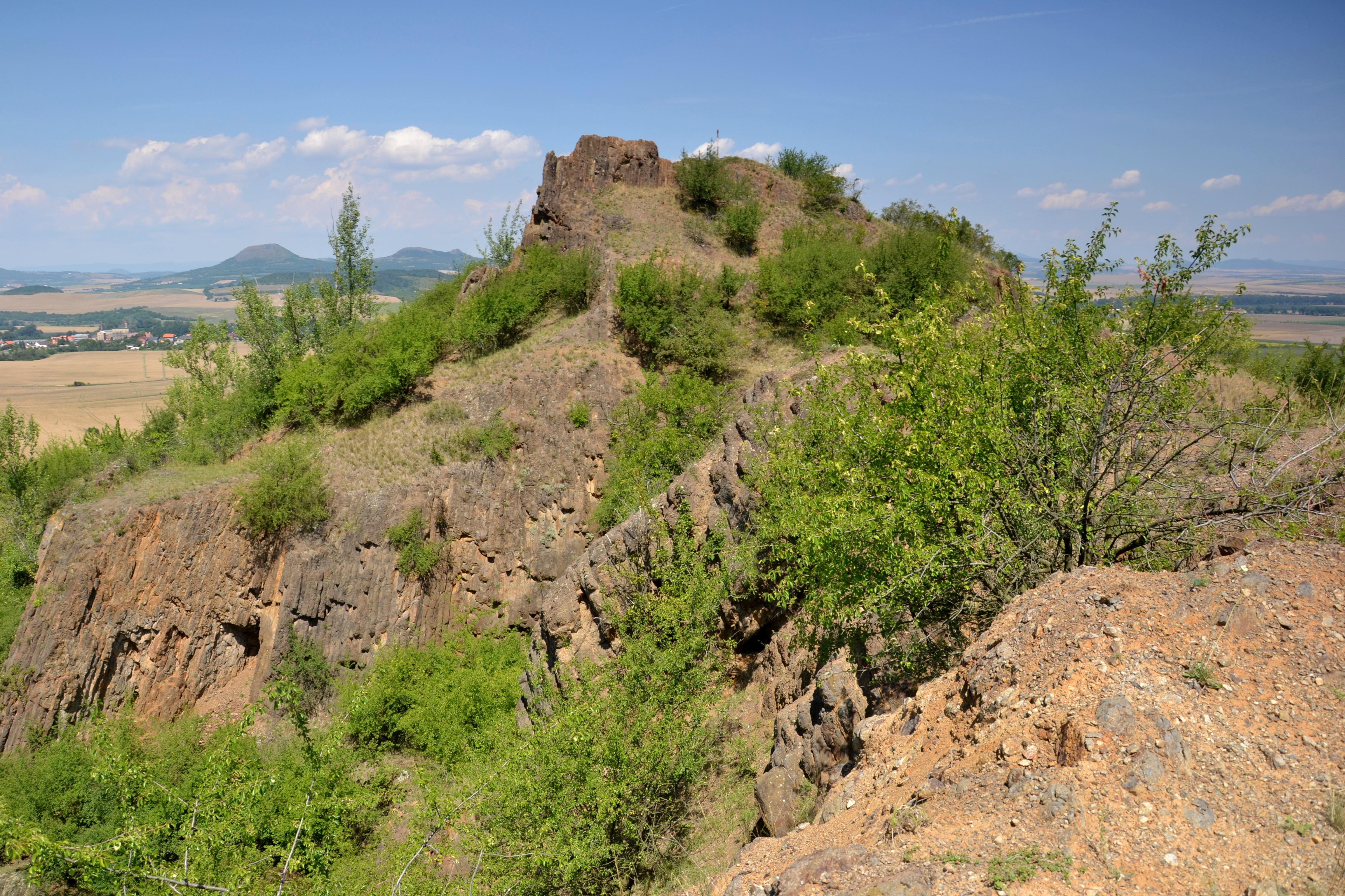 Blšanský chlum – vrcholová část kopce s opuštěným lomem